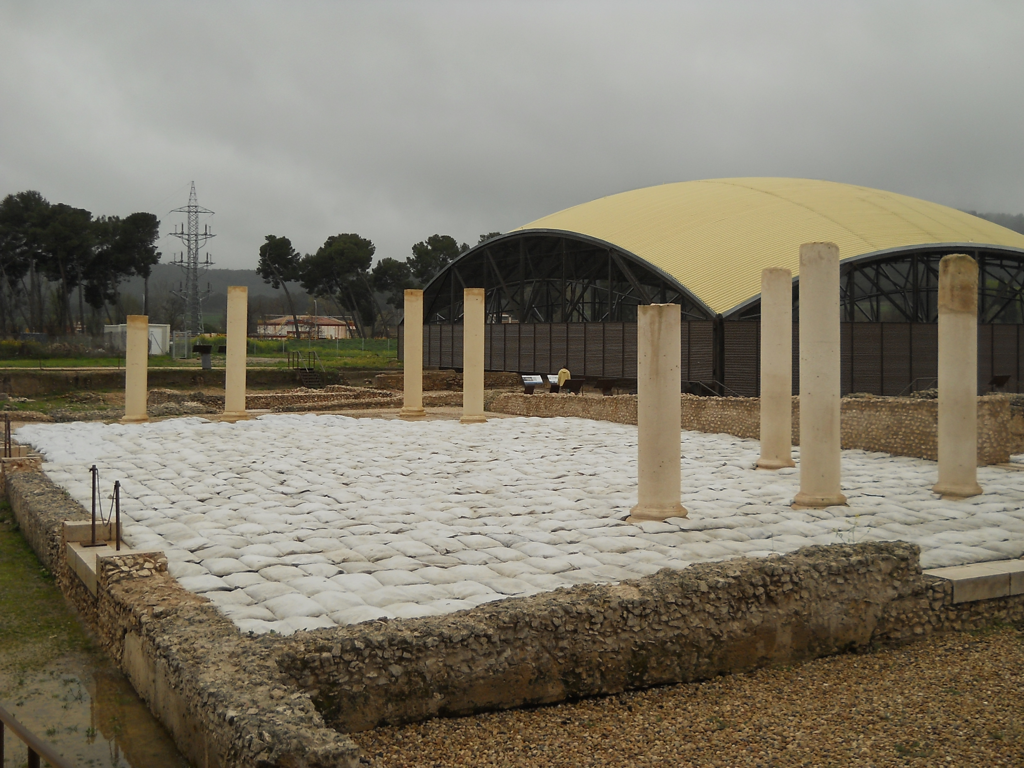 Basílica civil, Yacimiento de Complutum, Alcalá de Henares, Madrid, España